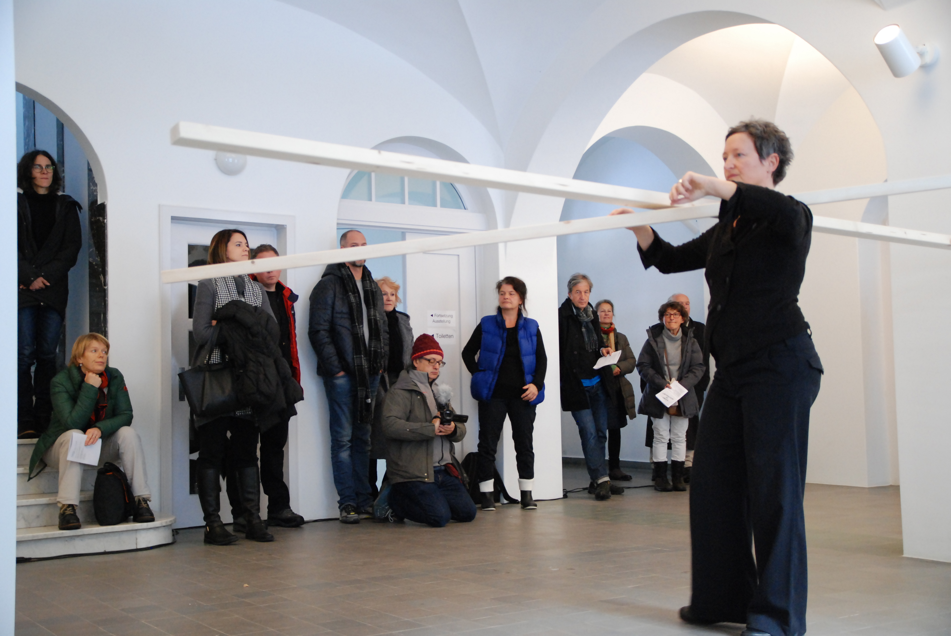 Performance Judith Huber, "2x Fichte", im Rahmen von Nairs in Movimaint 2017 im Zentrum für Gegenwartskunst NAIRS.